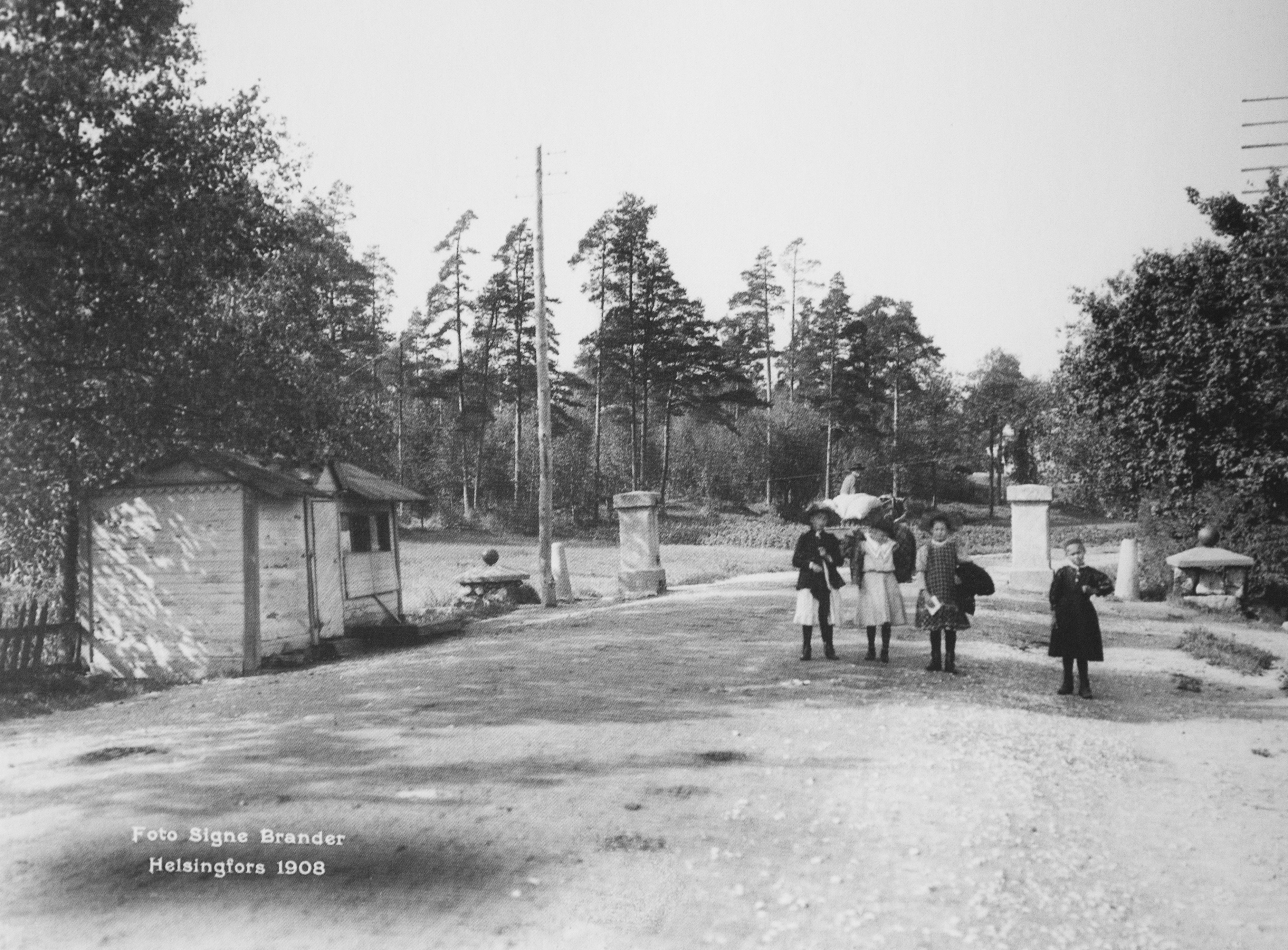 Vanha tulliportti kaupungin rajalla Läntisellä Viertotiellä vuonna 1908